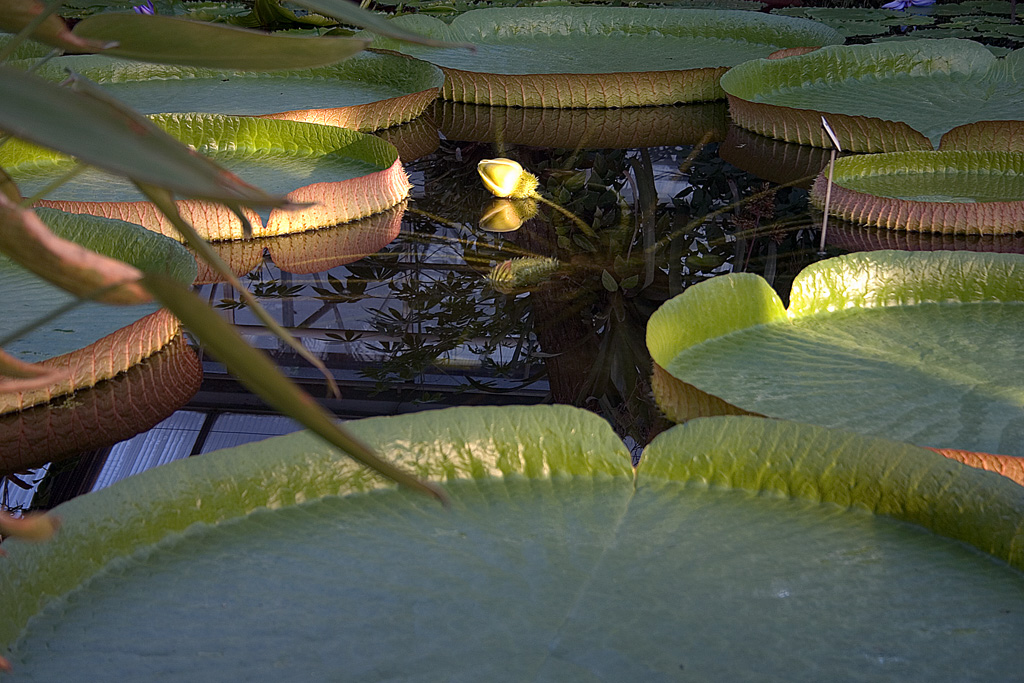 Beschreibung, Quelle und Lizenz Seerose Victoria (Victoria cruziana) im Botanischen Garten der TU Dresden, aufgenommen am 21. September (Abend der Blüte) 2005. (c) 2005 Ulrich van Stipriaan (User:Stipriaan)